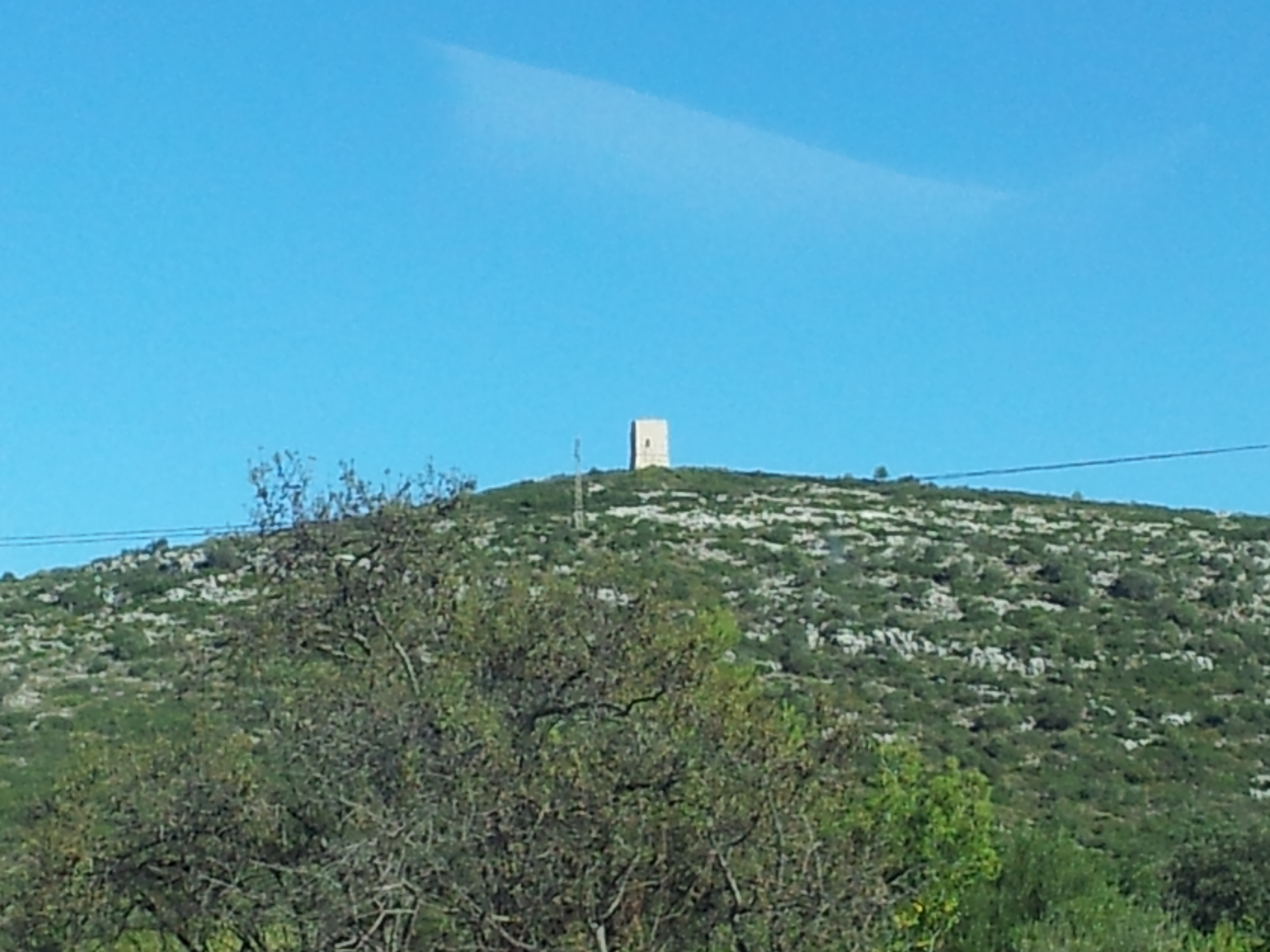 Torre de San Millán (Santa Magdalena de Polpís)